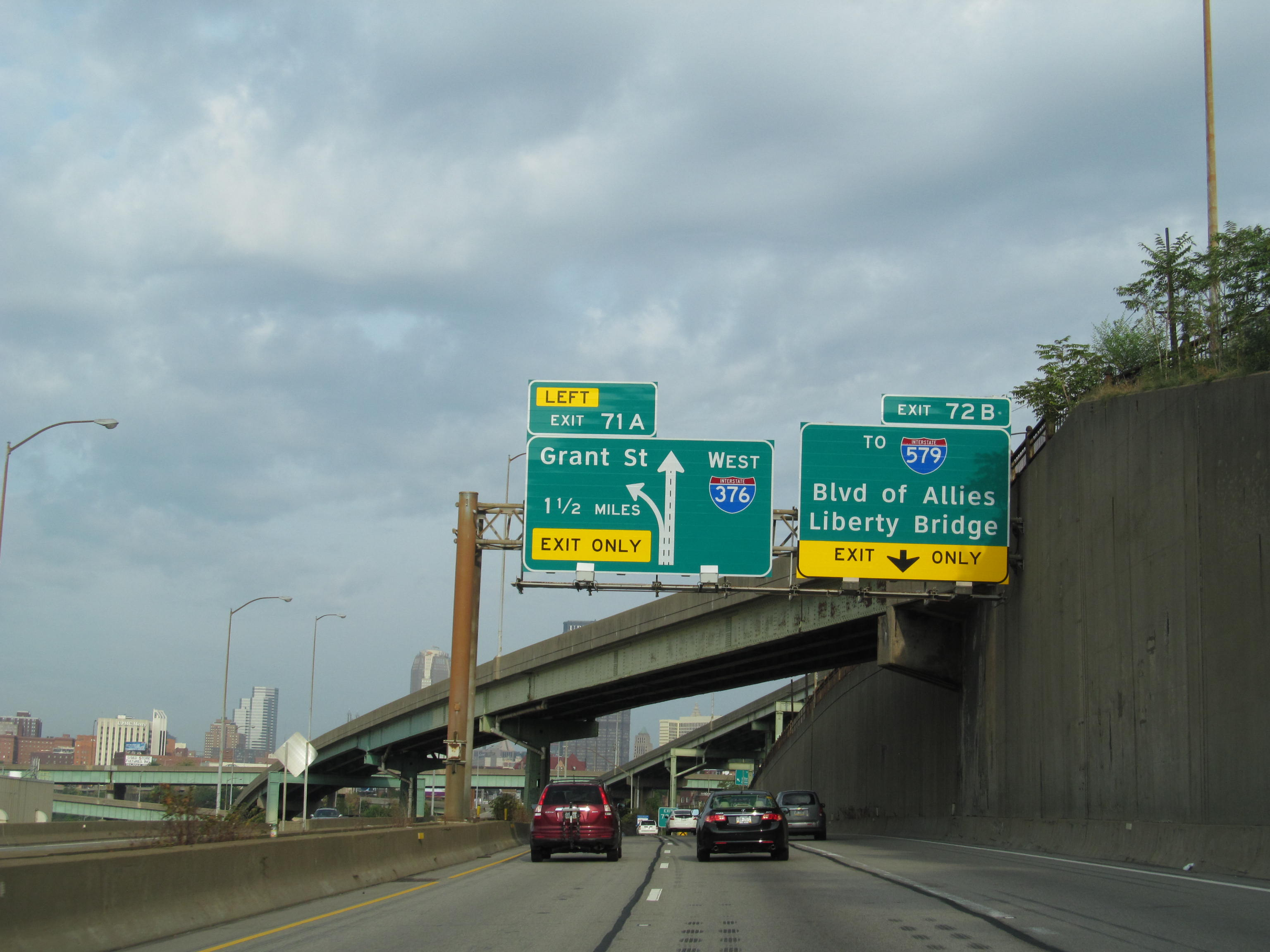 Interstate 376 - Pennsylvania